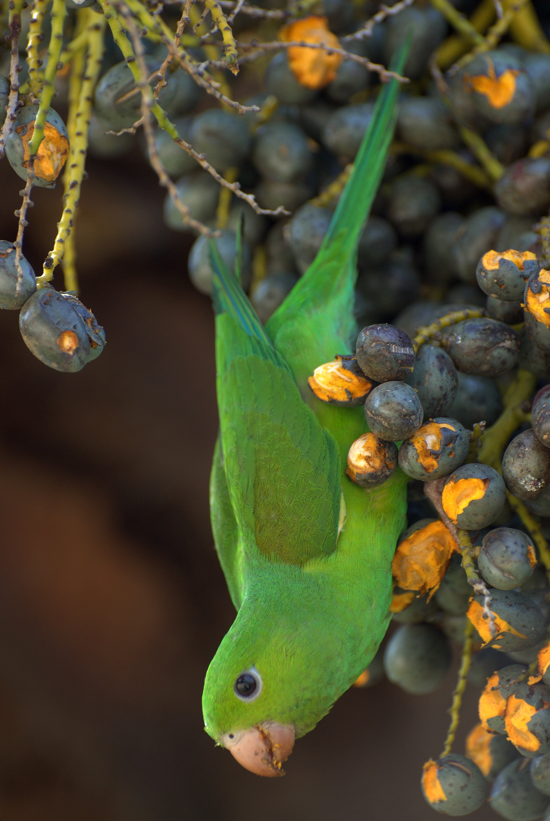 Brotogeris tirica, Parque da Independência, Museu do Ipiranga, São Paulo